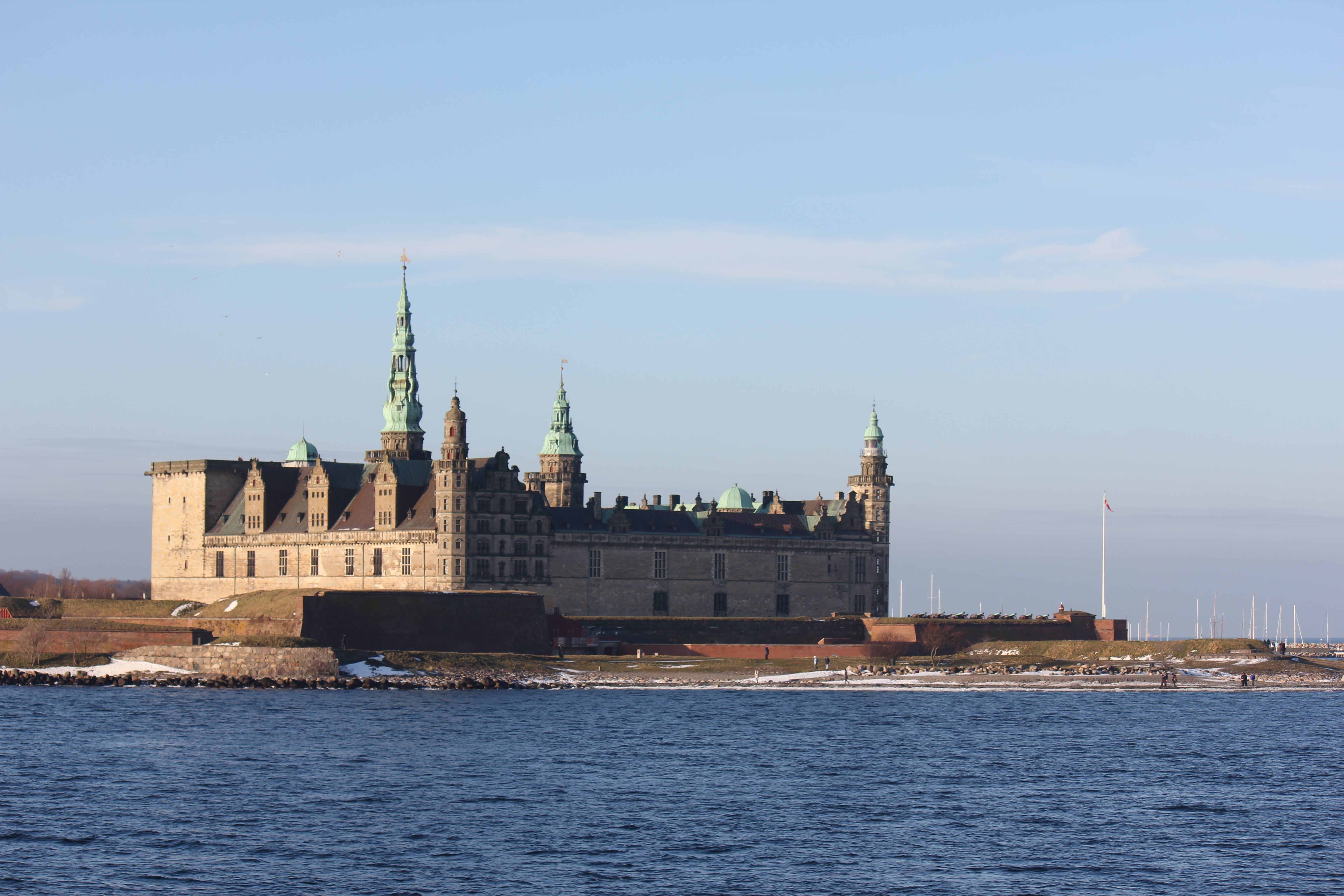 Kronborg Slot fra Øresund